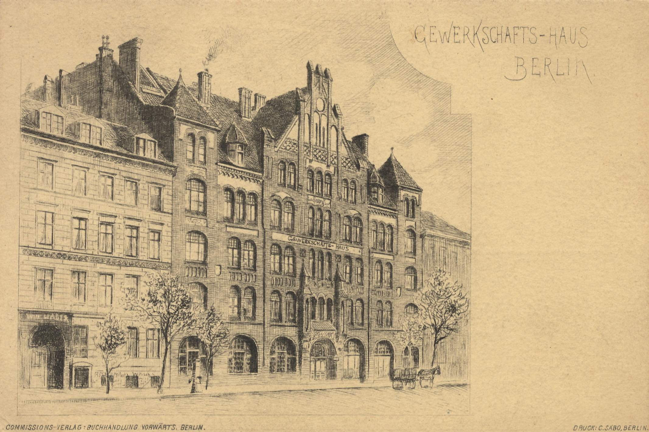 Gewerkschaftshaus am Engelufer (seit 1937 Engeldamm 62/64), Berlin-Mitte. Im Ersten und Zweiten Weltkrieg Notkrankenhaus, danach bis 1990 Krankenhaus Mitte, bis 1997 Institut für Tropenmedizin. Nun Privatbesitz mit Umbau zu Wohn- und Gewerbeobjekt.